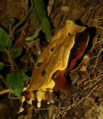 Bufo superciliaris